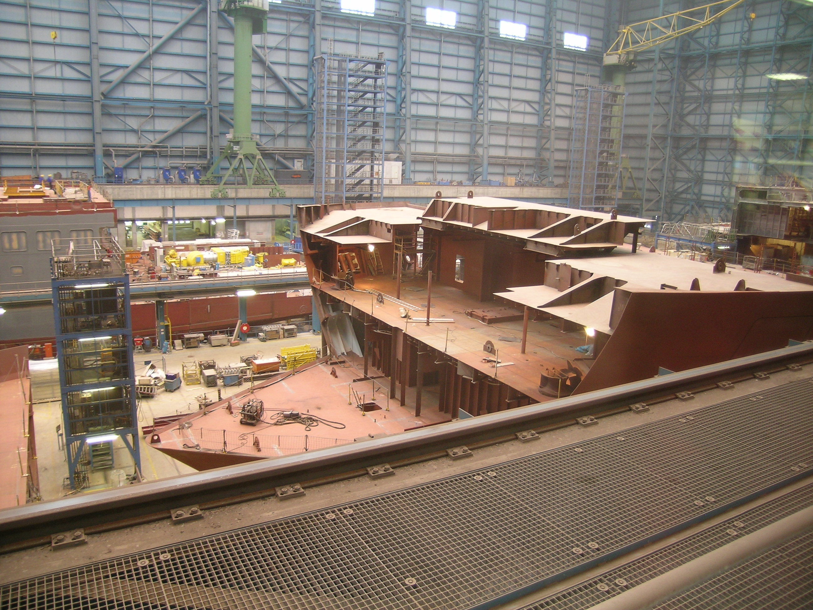 Norwegian Pearl i.Dock d.Meyerwerft April 2006